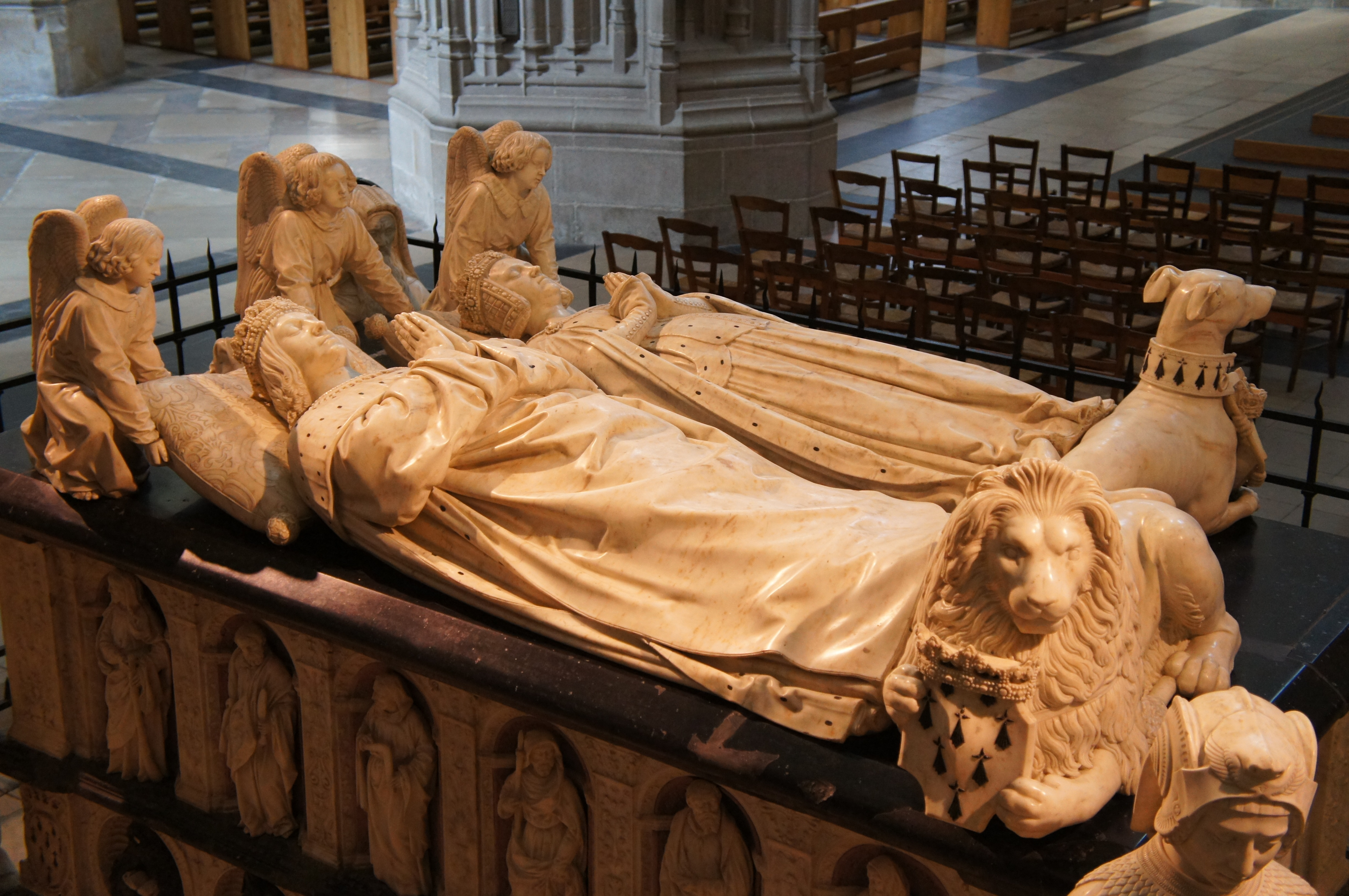 Dans le transept sud de la cathédrale Saint Pierre et Saint Paul de Nantes. Le tombeau de François II et Marguerite de Foix, père d'Anne de Bretagne, est un chef-d’oeuvre de Michel Colombe du début du XVIe siècle. Ce tombeau est en marbre blanc. Aux quatre coins, quatre statues représentant les quatre vertus cardinales.